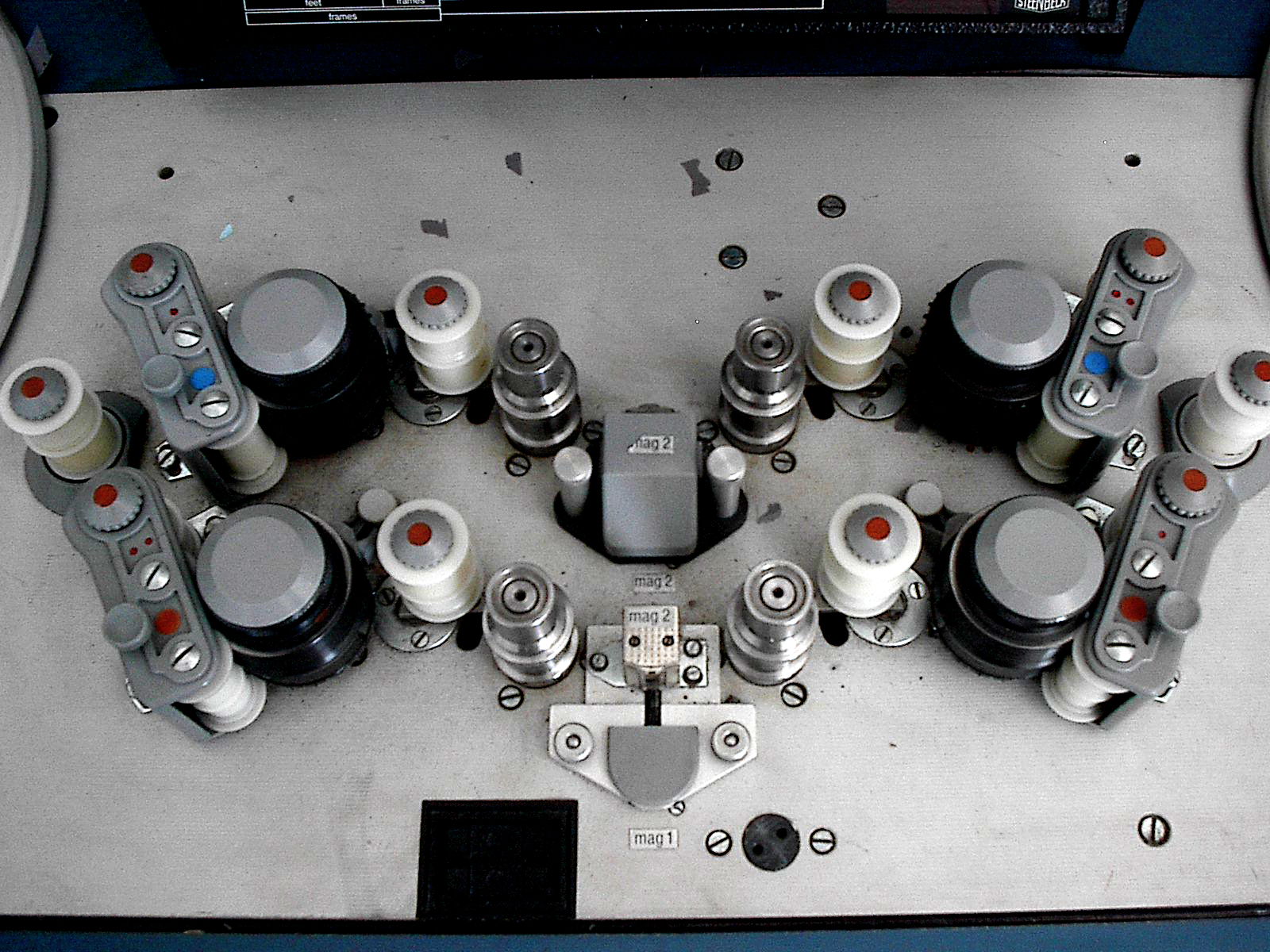 Transportmechanik eines Schneidetisches zur Filmtonpostproduktion